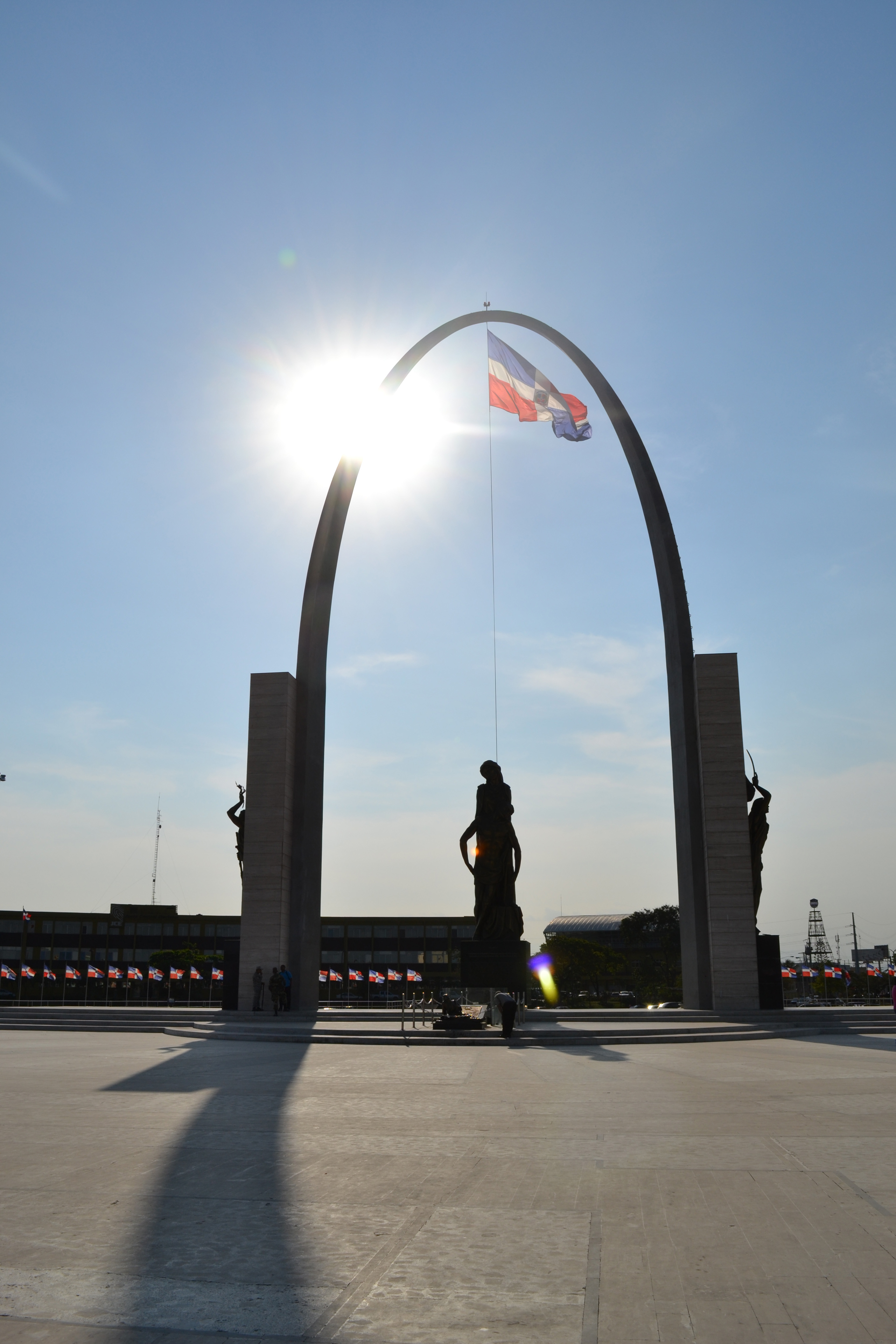 Foto tomada al arco de la bandera en la Plaza de la Independencia en Santo Domingo, República Dominicana. Av. Luperón con 27 de Febrero. Alcastaro